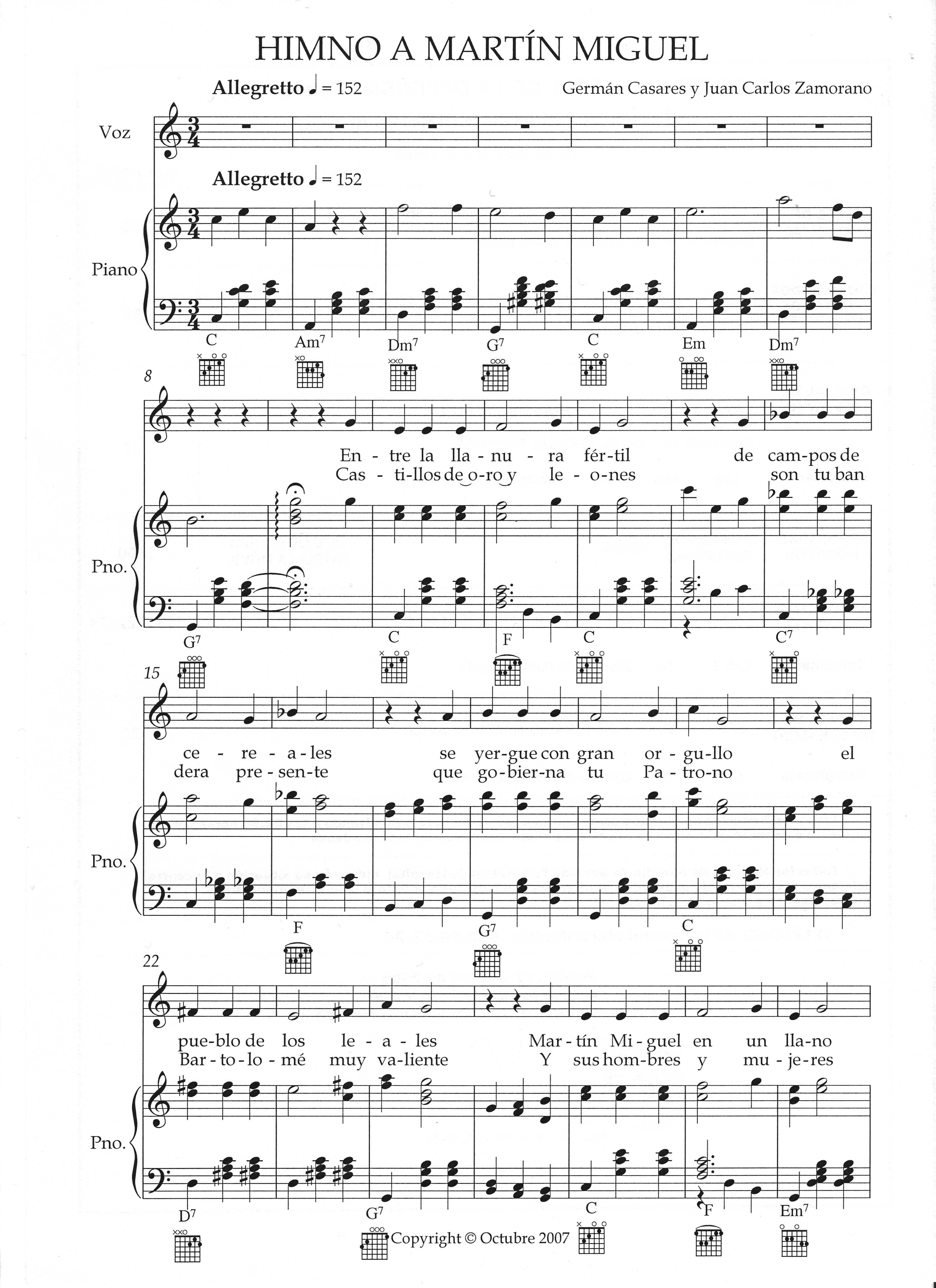 Partitura para piano y voz del Himno a Martin Miguel